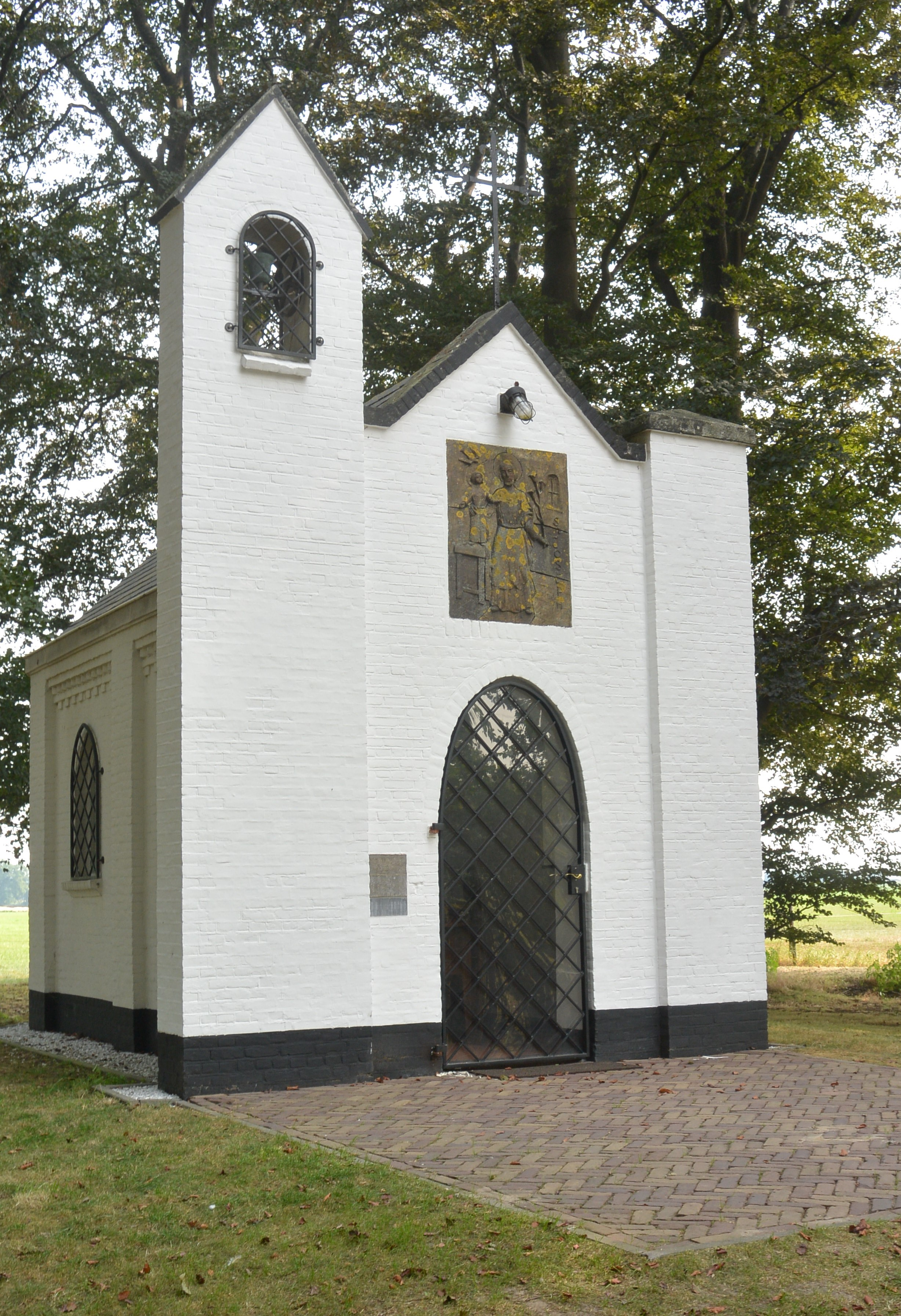 Kapel te Westerwijk (gemeente Hilvarenbeek) sinds 1967 gewijd aan Sint Jozef, daarvoor aan Maria, daarvoor aan Lambertus